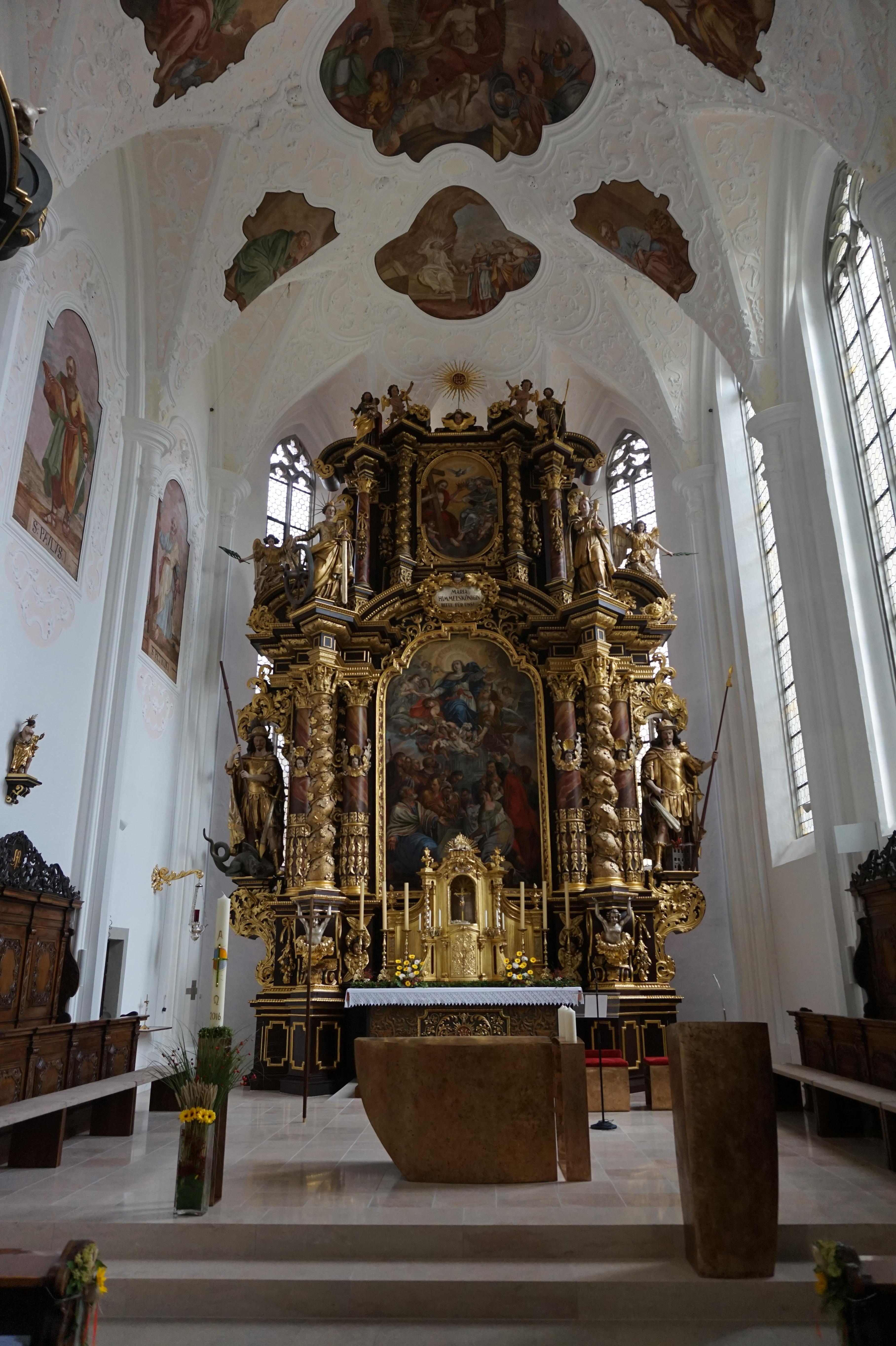 Altarraum mit barockem Hochaltar